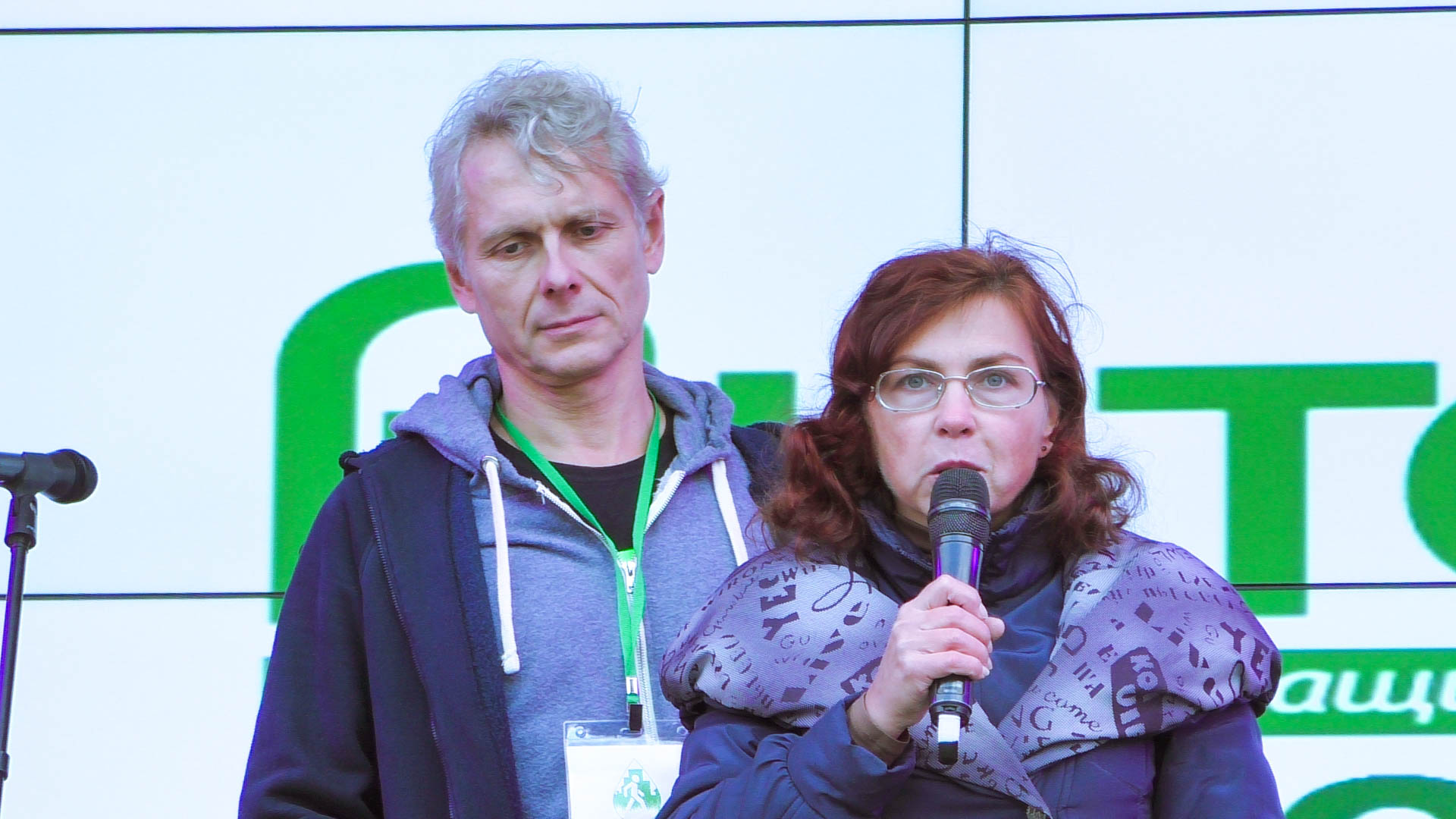 21.10.2017. Москва, Манежная площадь, праздник этичного образа жизни "Эмпатия".